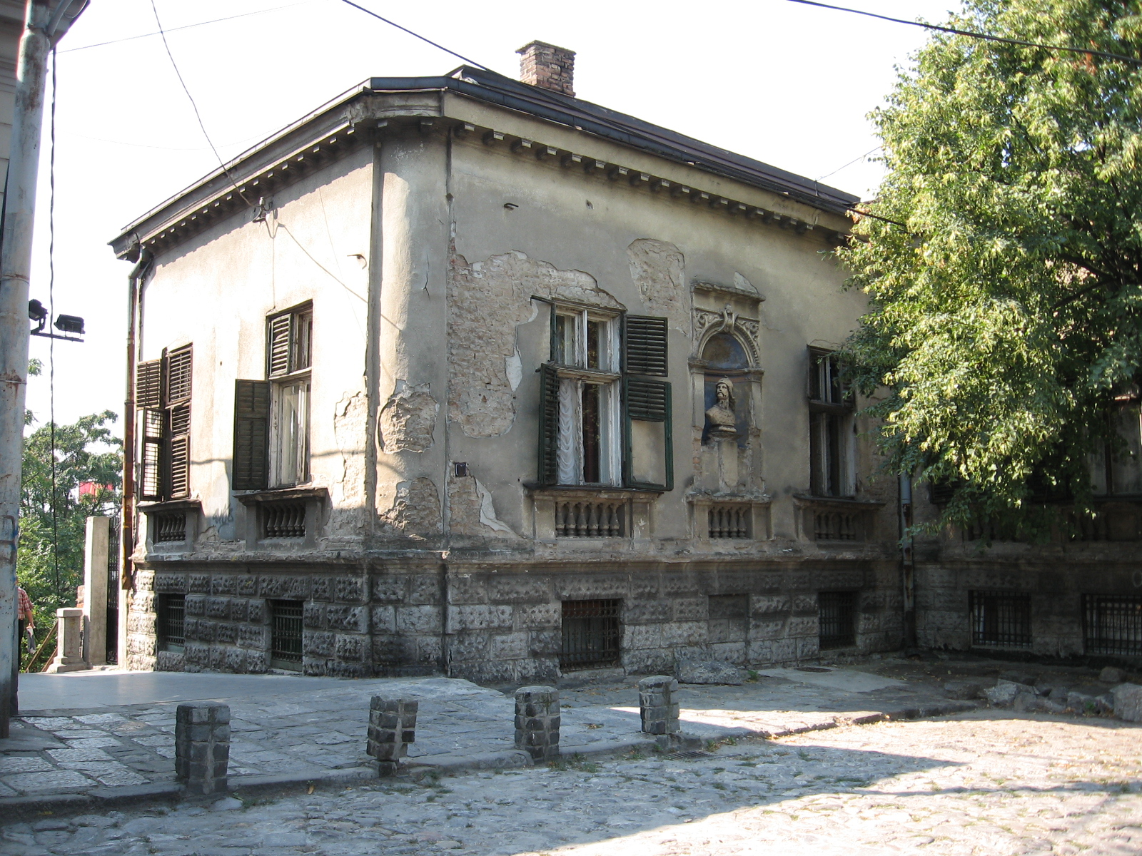 Kosančićev Venac - Beograd